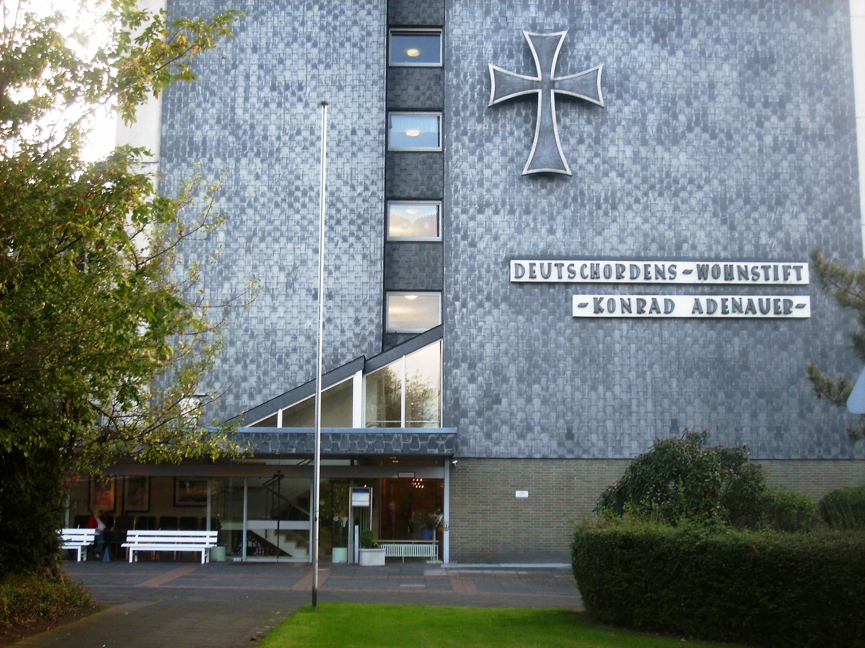 Eingang und Emblem des Deutschordens-Wohnstift in Köln-Neubrück